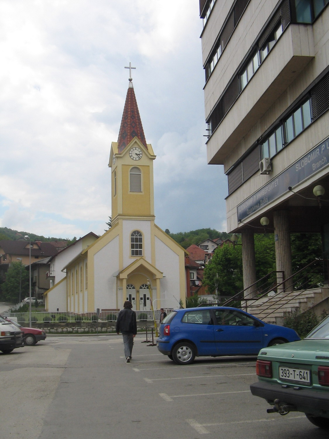 Župna crkva u Doboju.